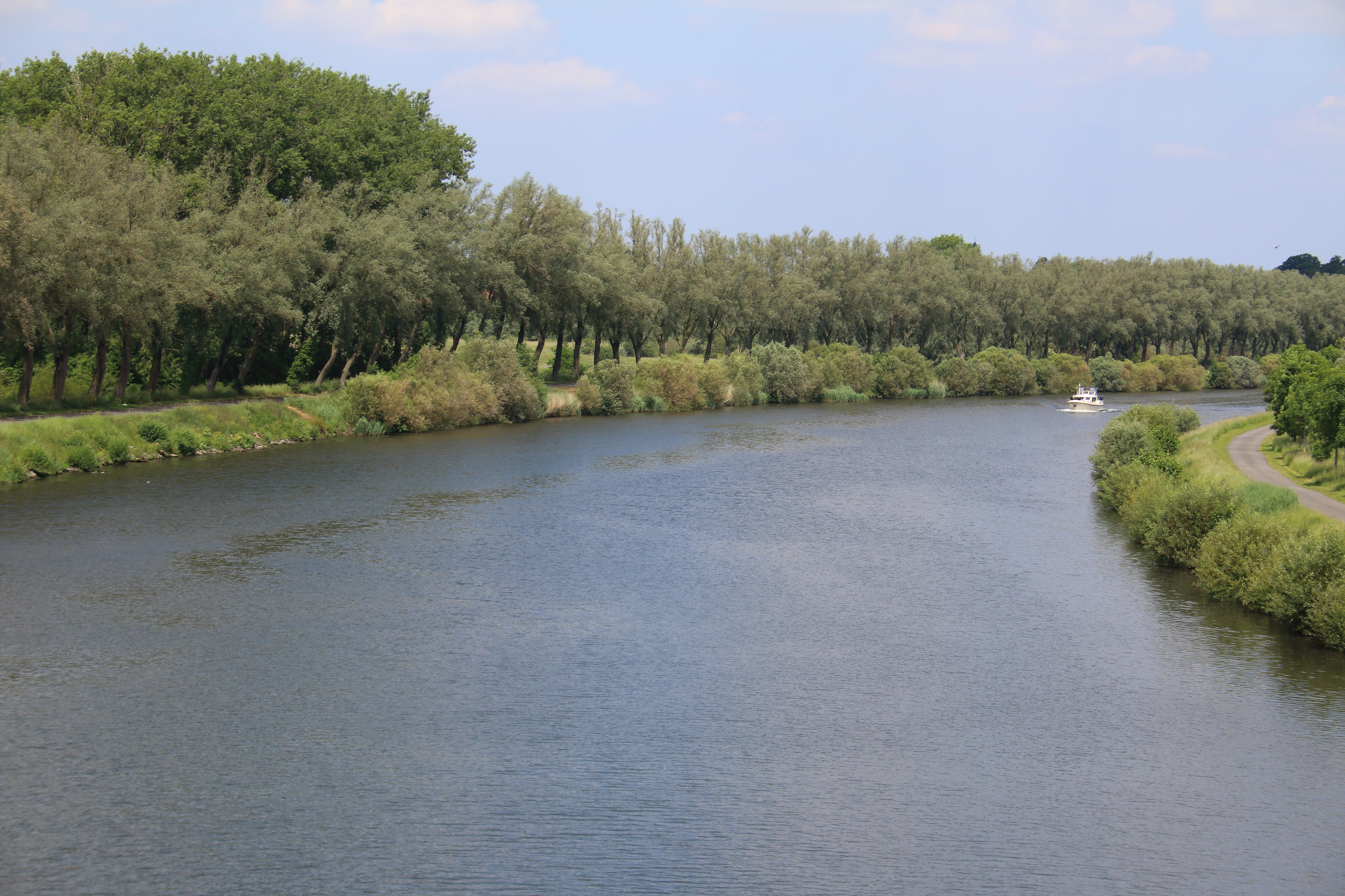 Schelde, Heurnemeersen, Oudenaarde, Vlaanderen, België